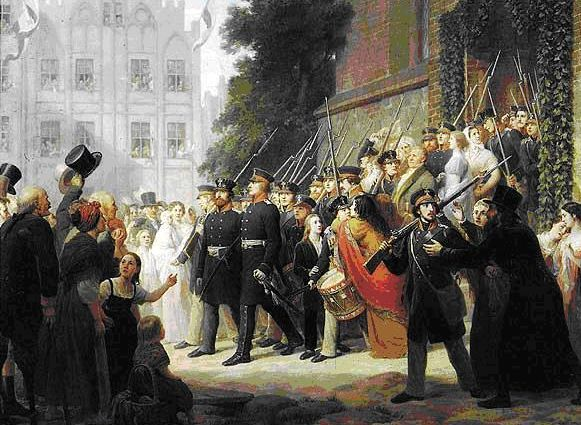 Auszug der ostpreußischen Landwehr 1813 ins Feld